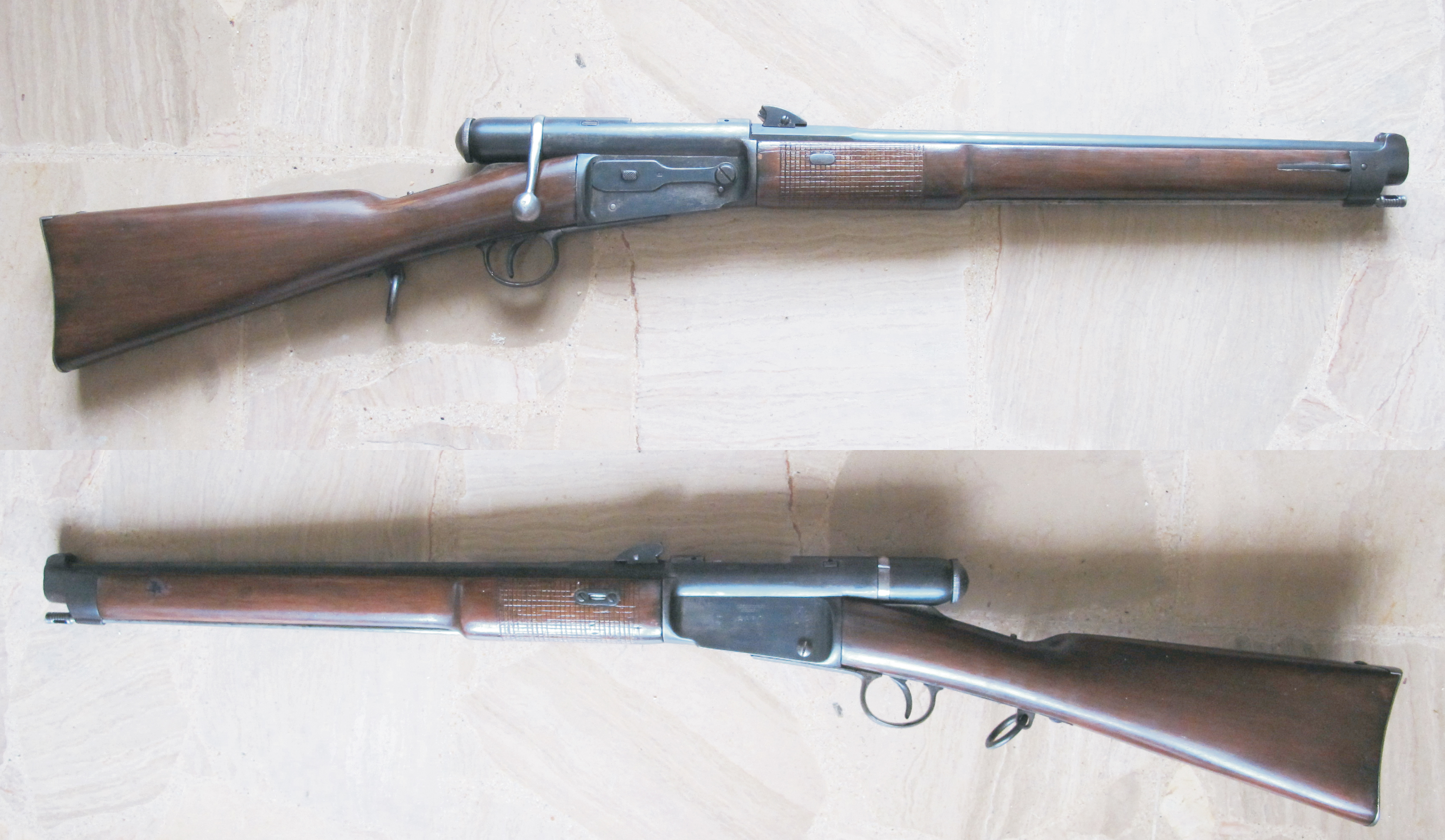 Mousqueton de cavalerie Vetterli, modèle 71/78.